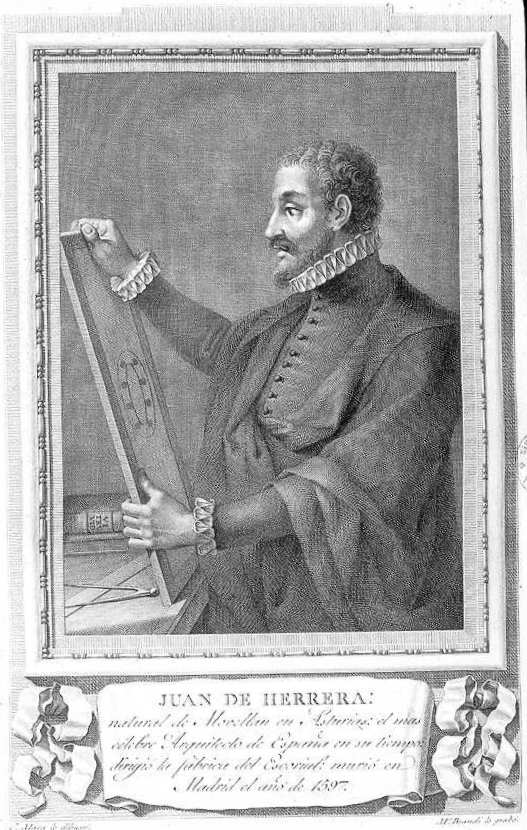 Retrato de Juan de Herrera